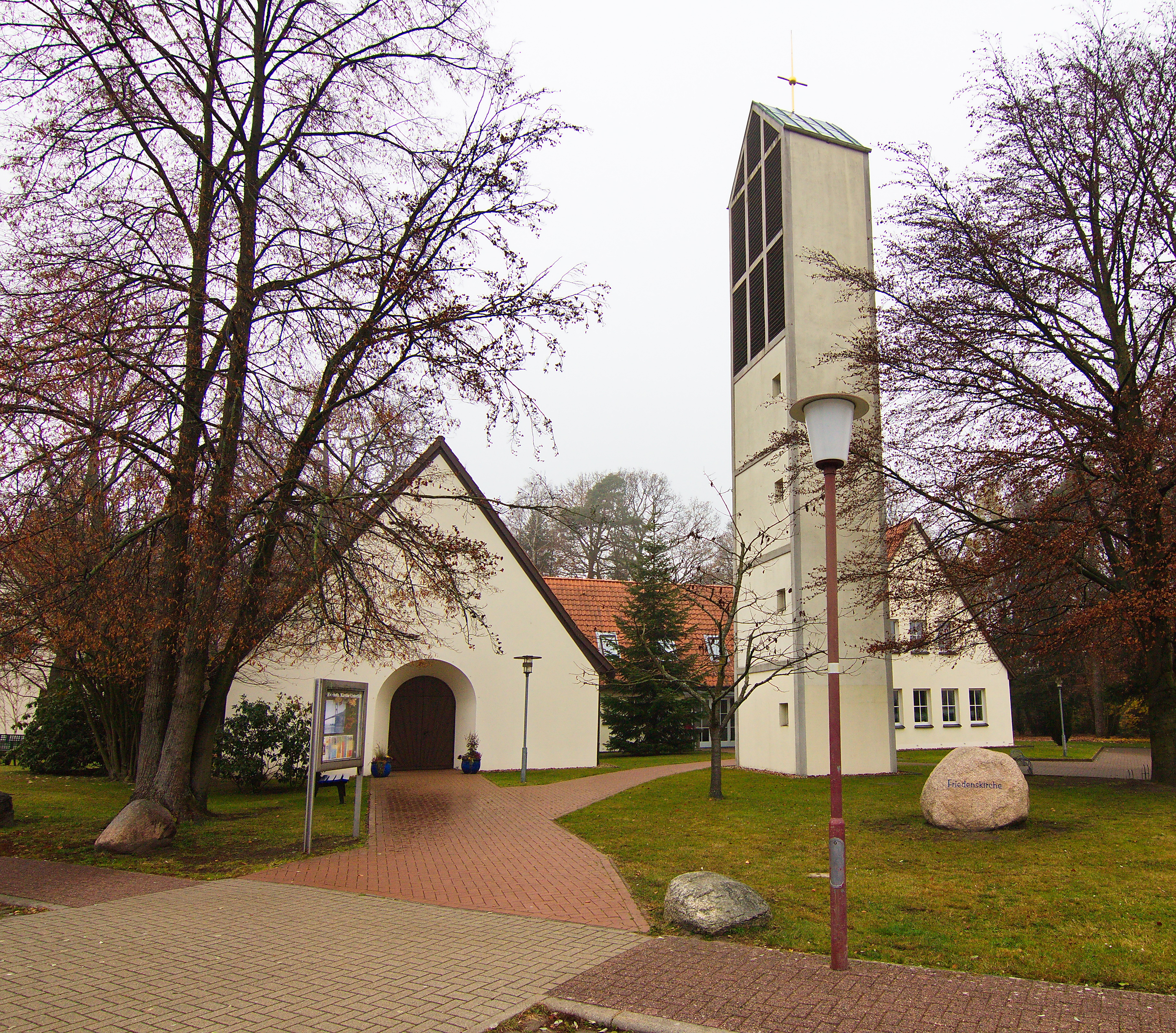 Friedenskirche in Unterlüß, Niedersachsen, Deutschland